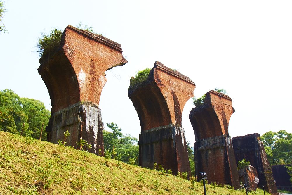 苗栗縣龍騰斷橋